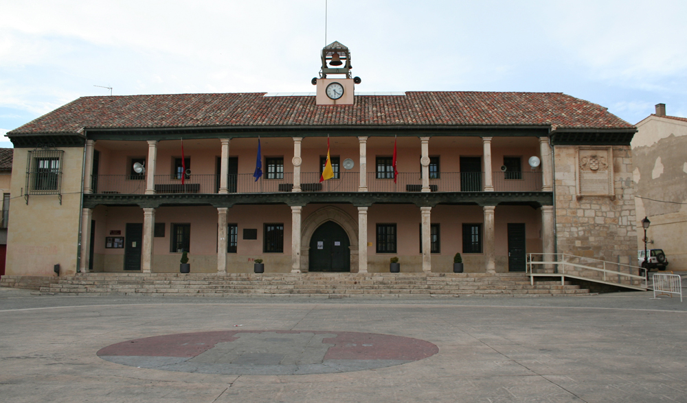 Edificio consistorial